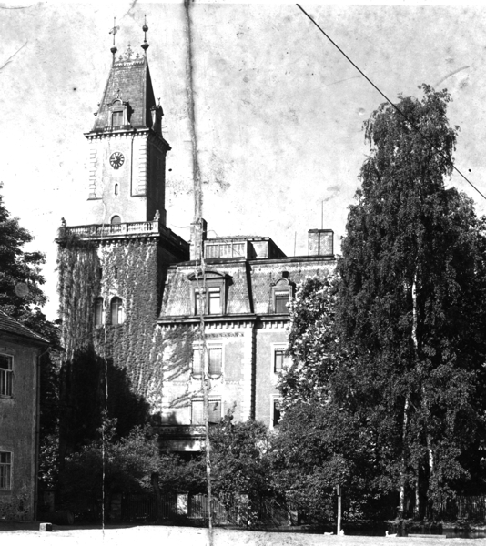 Schloss Seerhausen nach dem Umbau (Bild ca. 1927)